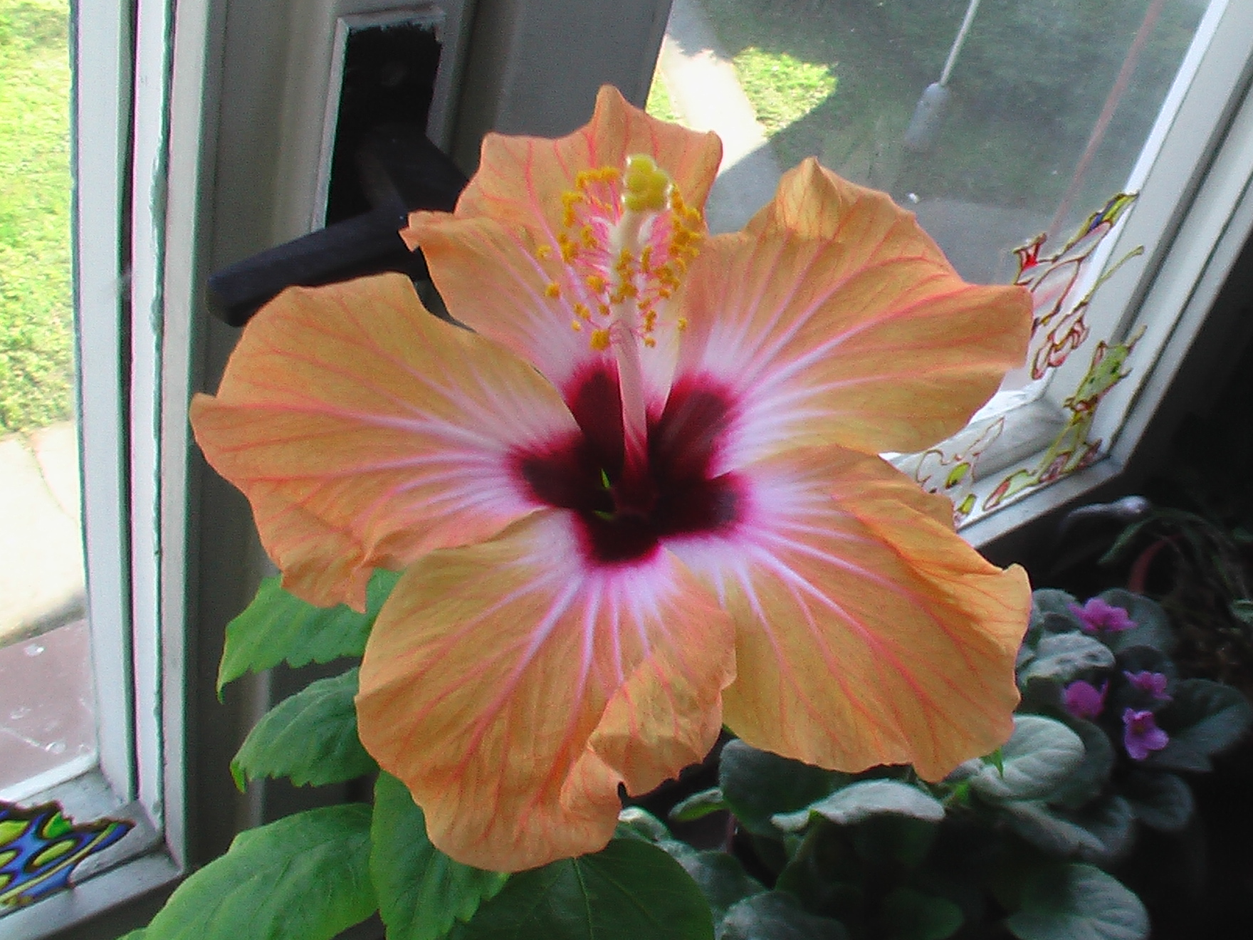 hibiscus